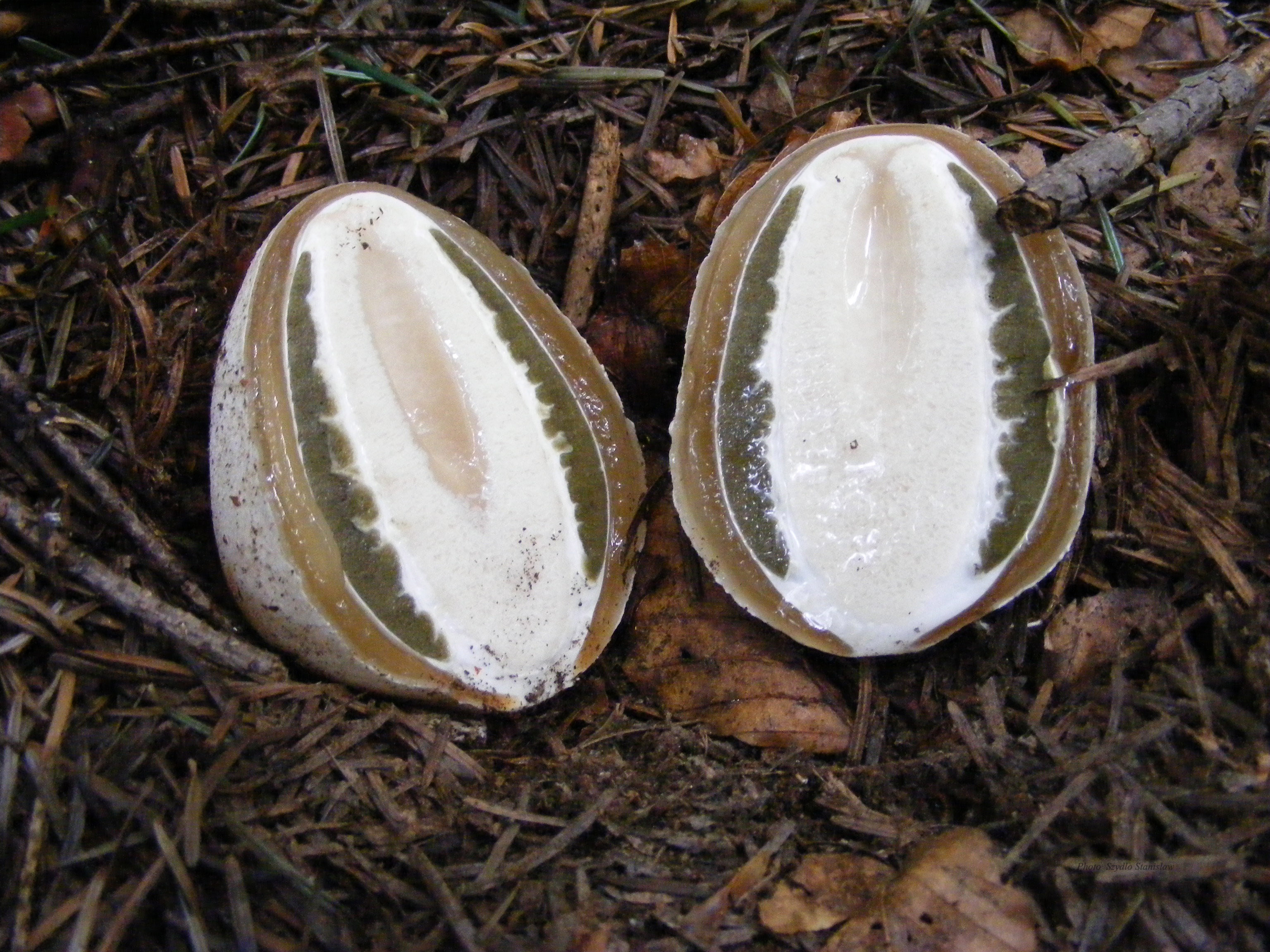 Sromotnik smrodliwy przecięty-Phaullus impudicus.